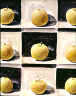 Bild ist von der Installation im Kunsthaus Grenchen von Andreas Schiller